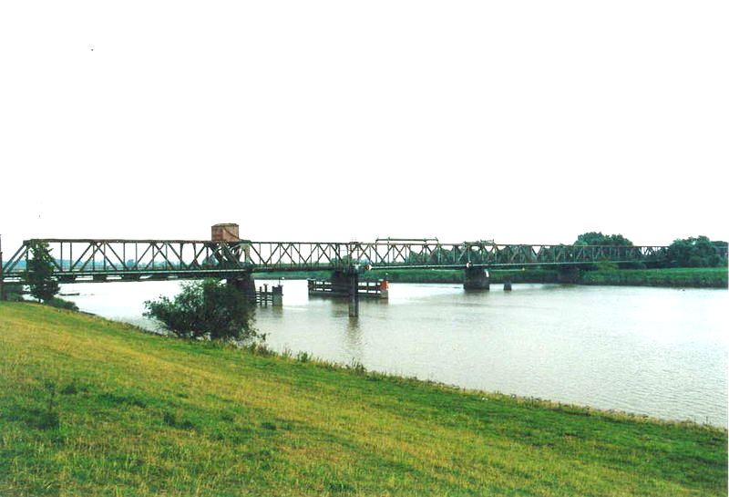 Friesebréck bei Weener